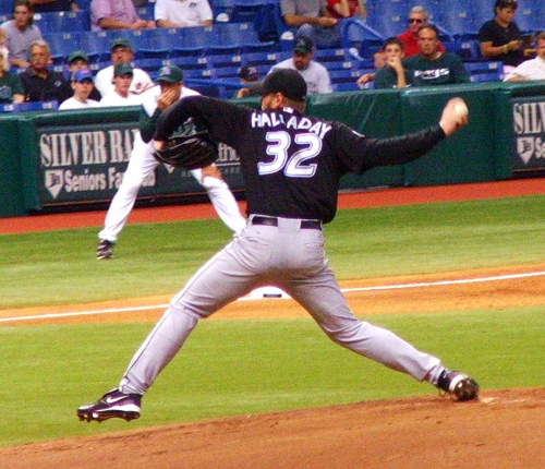 Roy Halladay